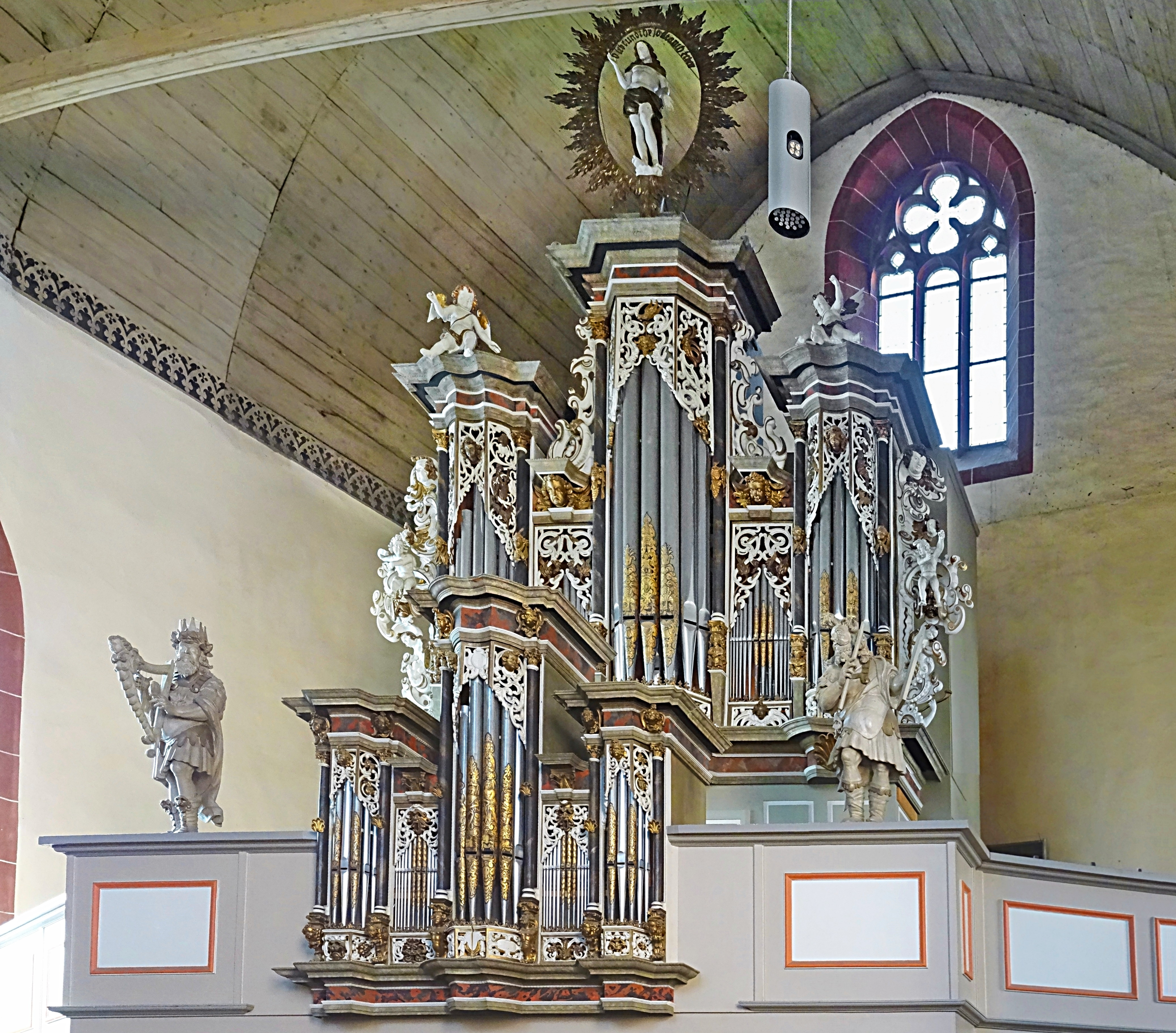 Orgel in der Michaeliskirche Erfurt, einem Orgelneubau (1896 Friedrich Petersilie und 2000 W. Rühle & Sohn) im Gehäuse von Ludwig Compenius (1652).